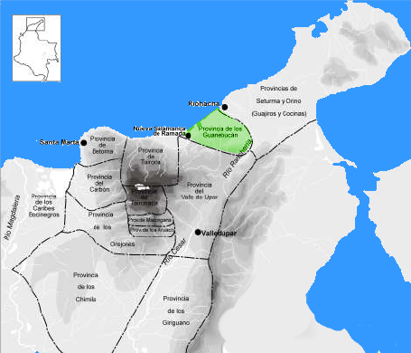 Provincia Guanebucan en la Gobernacion de Santa Marta in the year 1500